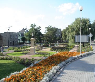 Mały park w Rogowie, powiat żniński